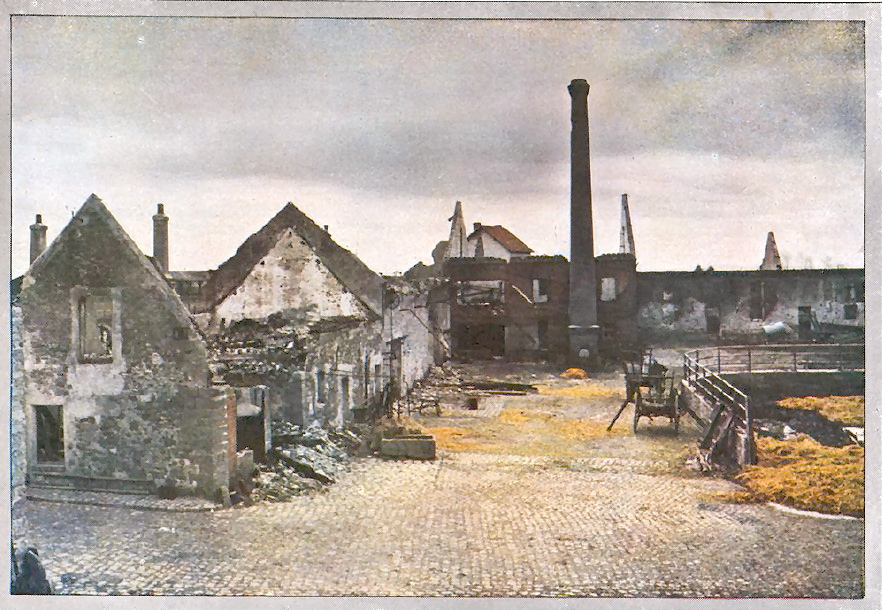 Ferme de Nogeon